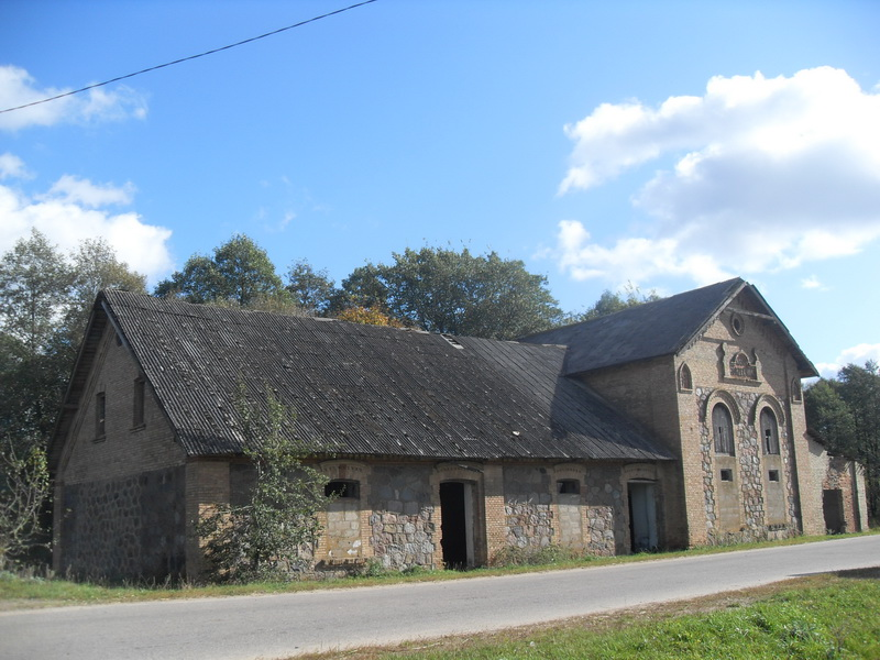 Міхайлоўшчына. Бровар